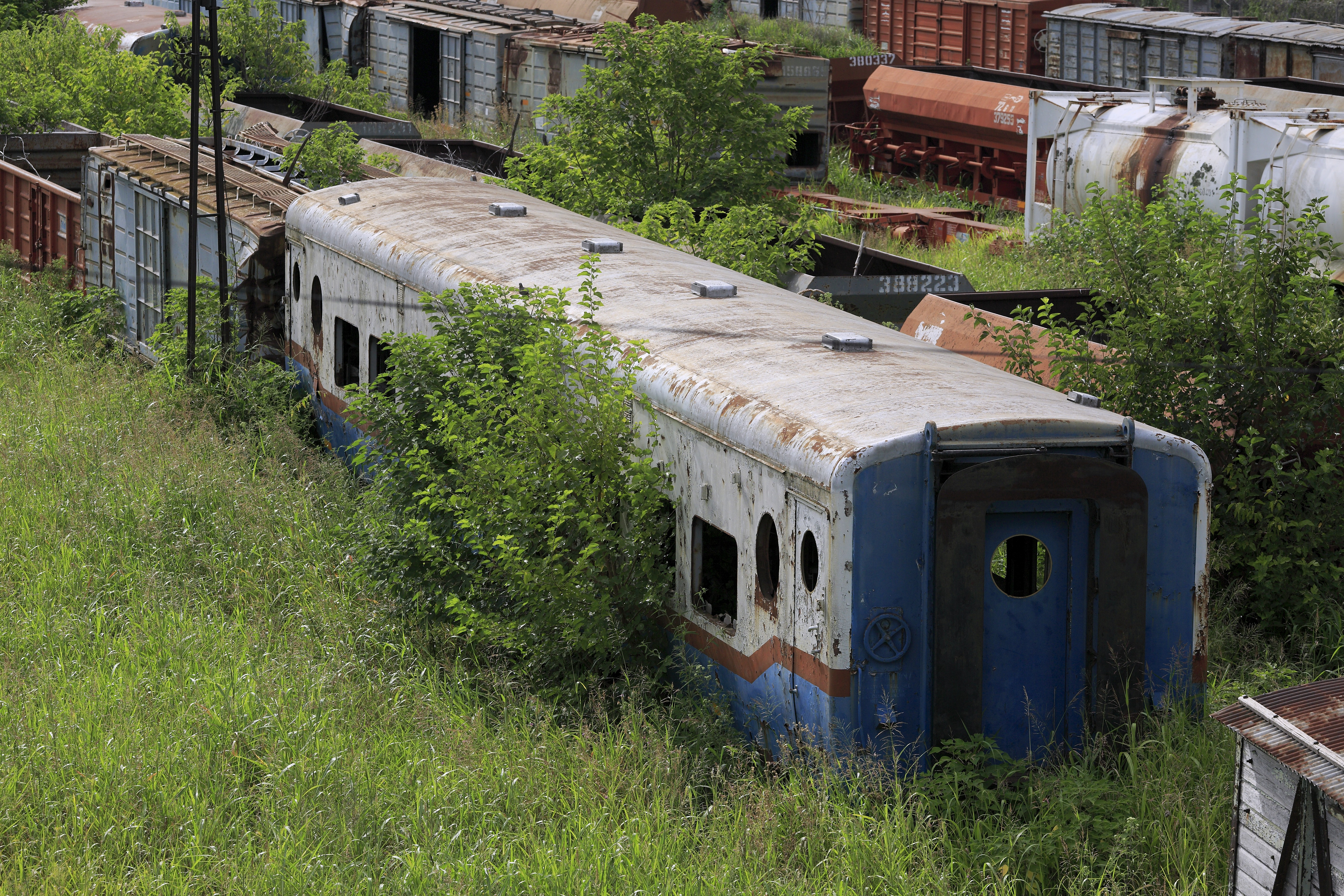 Meterspurreisezugwagen mit der klassischen Fiat-Materfer-Form und unten eingezogenen Seitenwänden, die es so nur bei Meterspurwagen gibt, jedoch nicht bei allen. Das lässt vermuten, dass es im Meterspurnetz Strecken mut unterschiwedlichem Lichtraum- und Fahrzeugumgrenzungsprofil gab oder gibt. Der Lack ist zwar verwittert, doch die Pigmente sind, offenbar aufgrund der Abschattung durch die Vegetation, deutlich besser erhalten als bei den Breitspurwagen im Bahnhiof Córdoba Mitre, die ebensolange abgestellt sind.